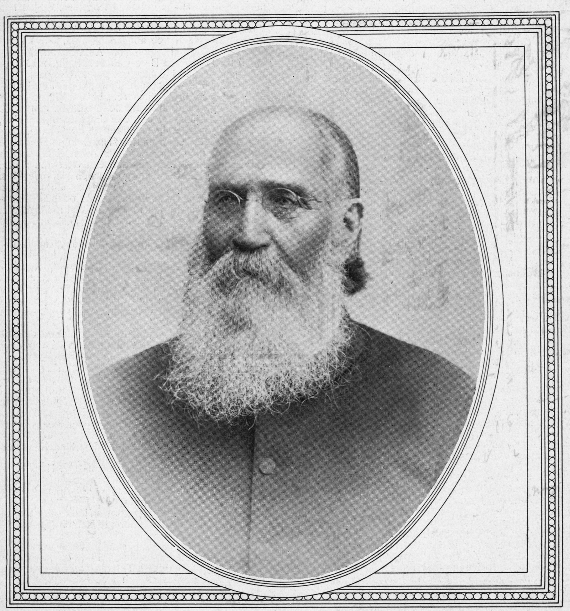 Anders Berg (1821-1912) på omslaget till Hvar 8 Dag 1912.